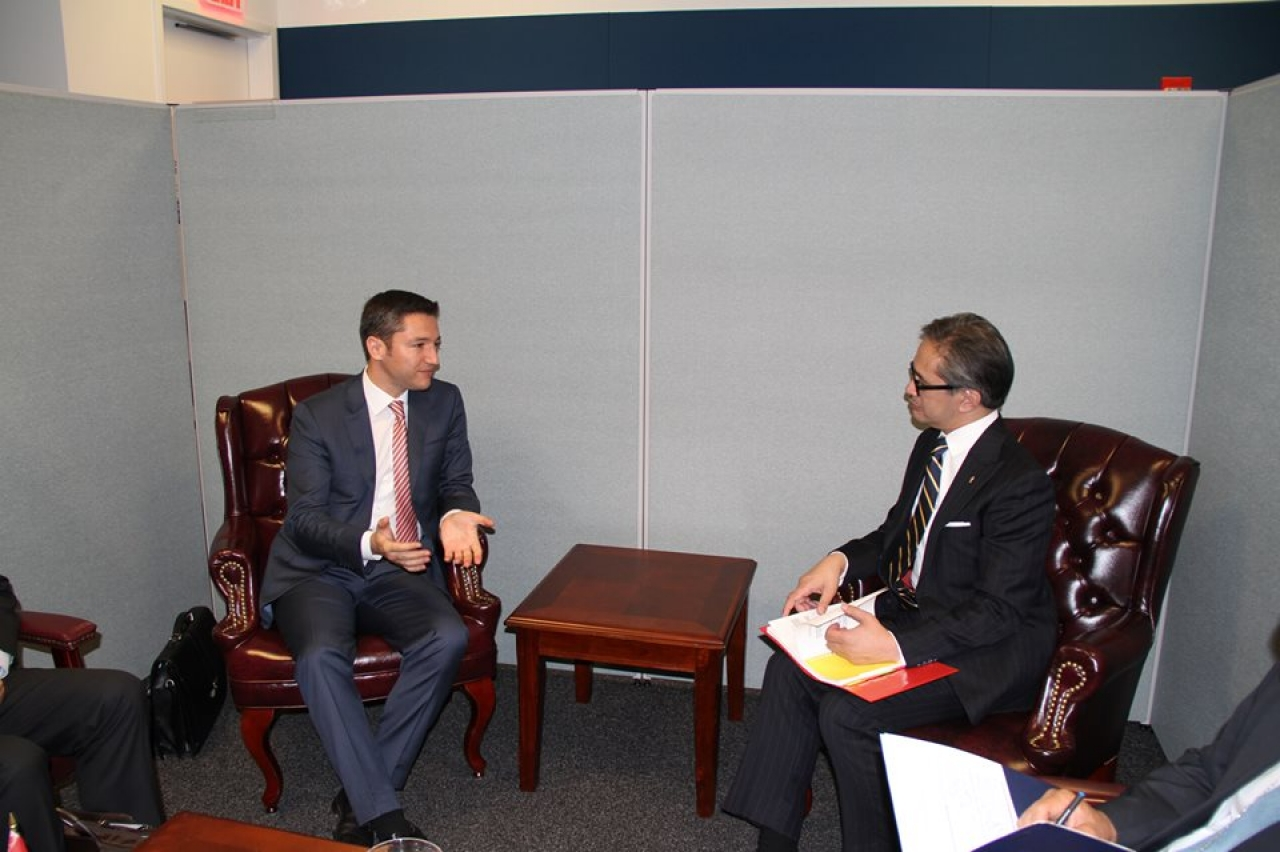 Кристиан Вигенин и министърът на външните работи на Индонезия Марти М. Наталегава